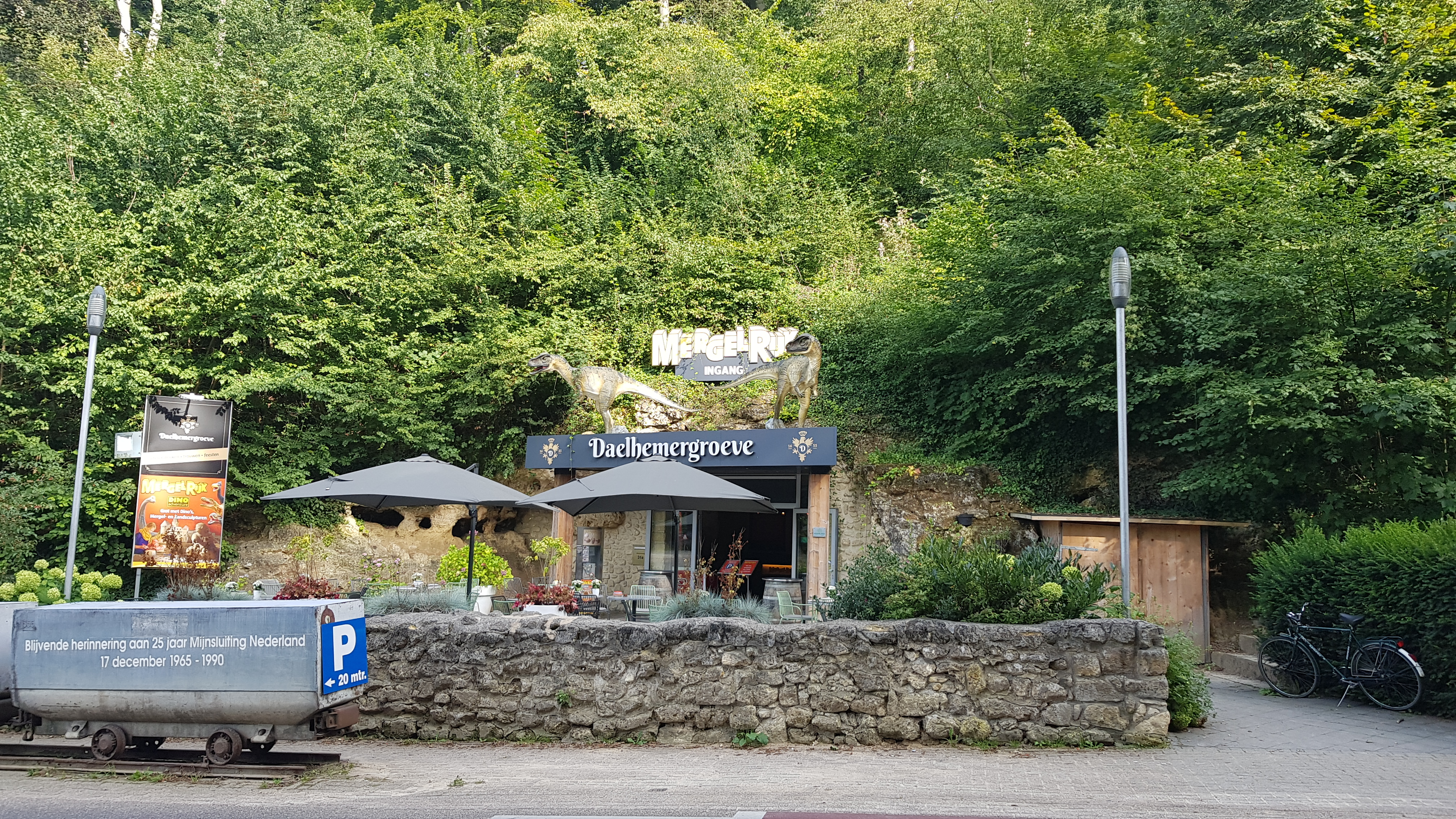 MergelRijk, Valkenburg, Nederland